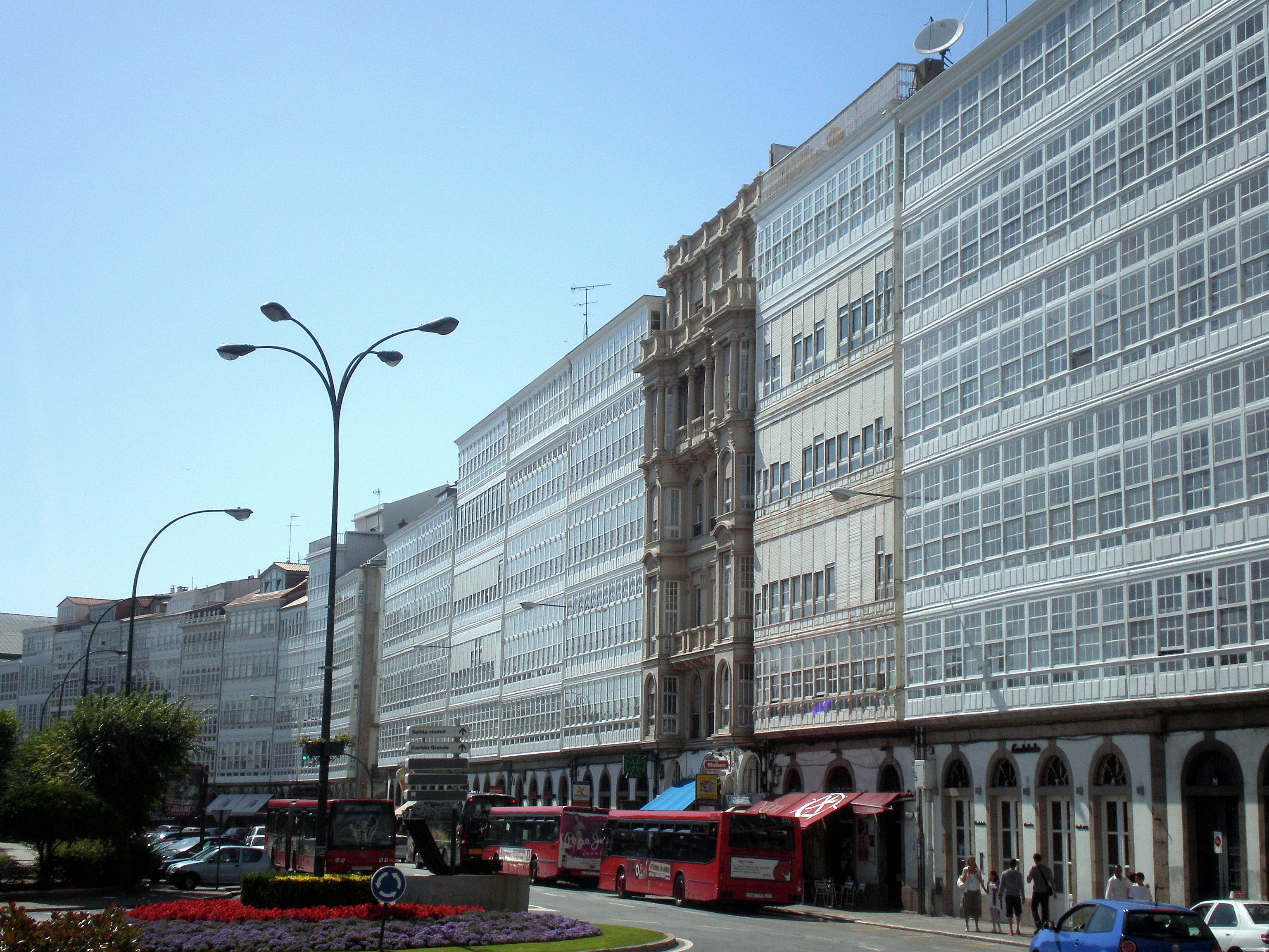 A Coruña, avenida da Marina.jpg